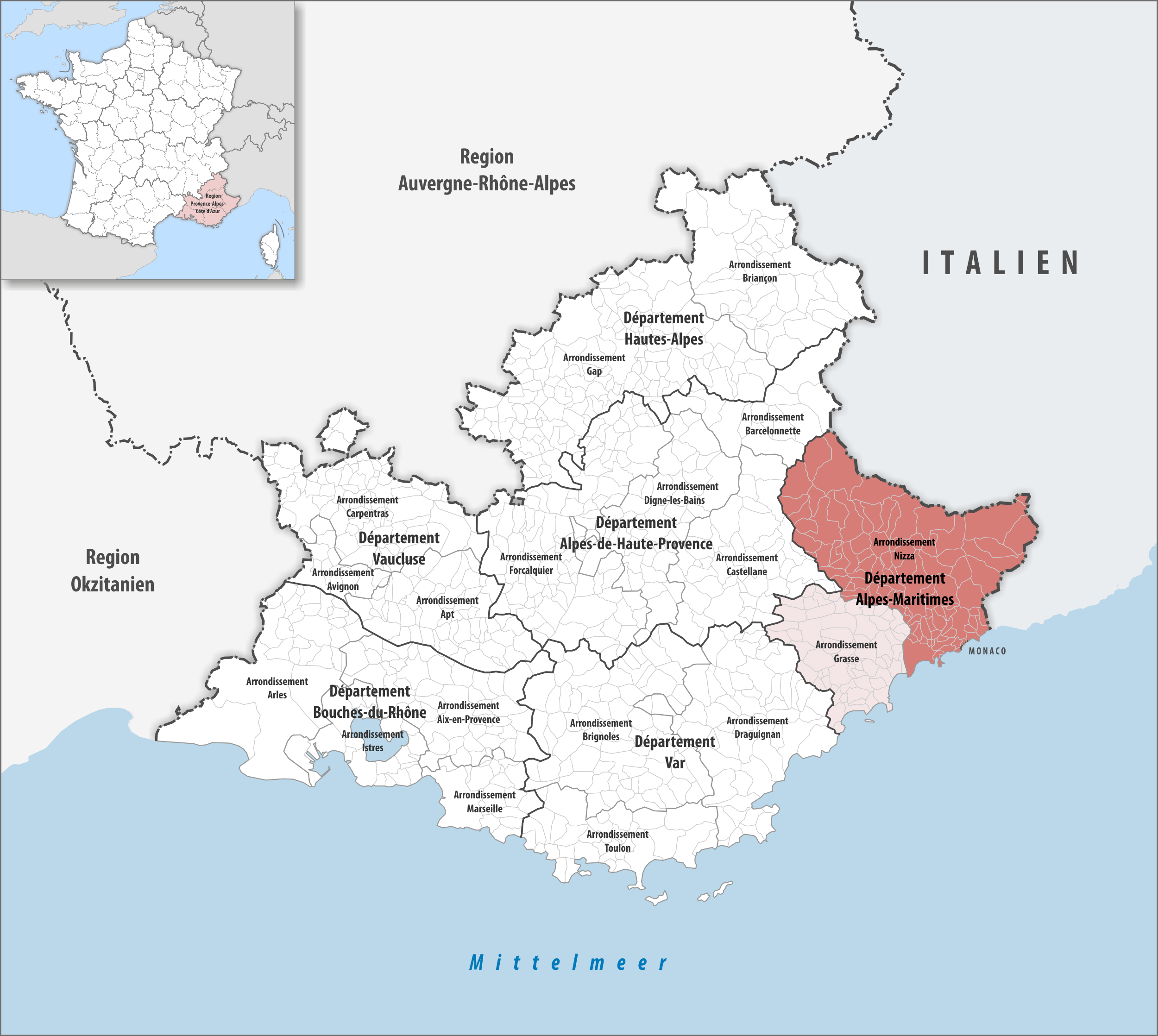 Lage des Arrondissements Nizza